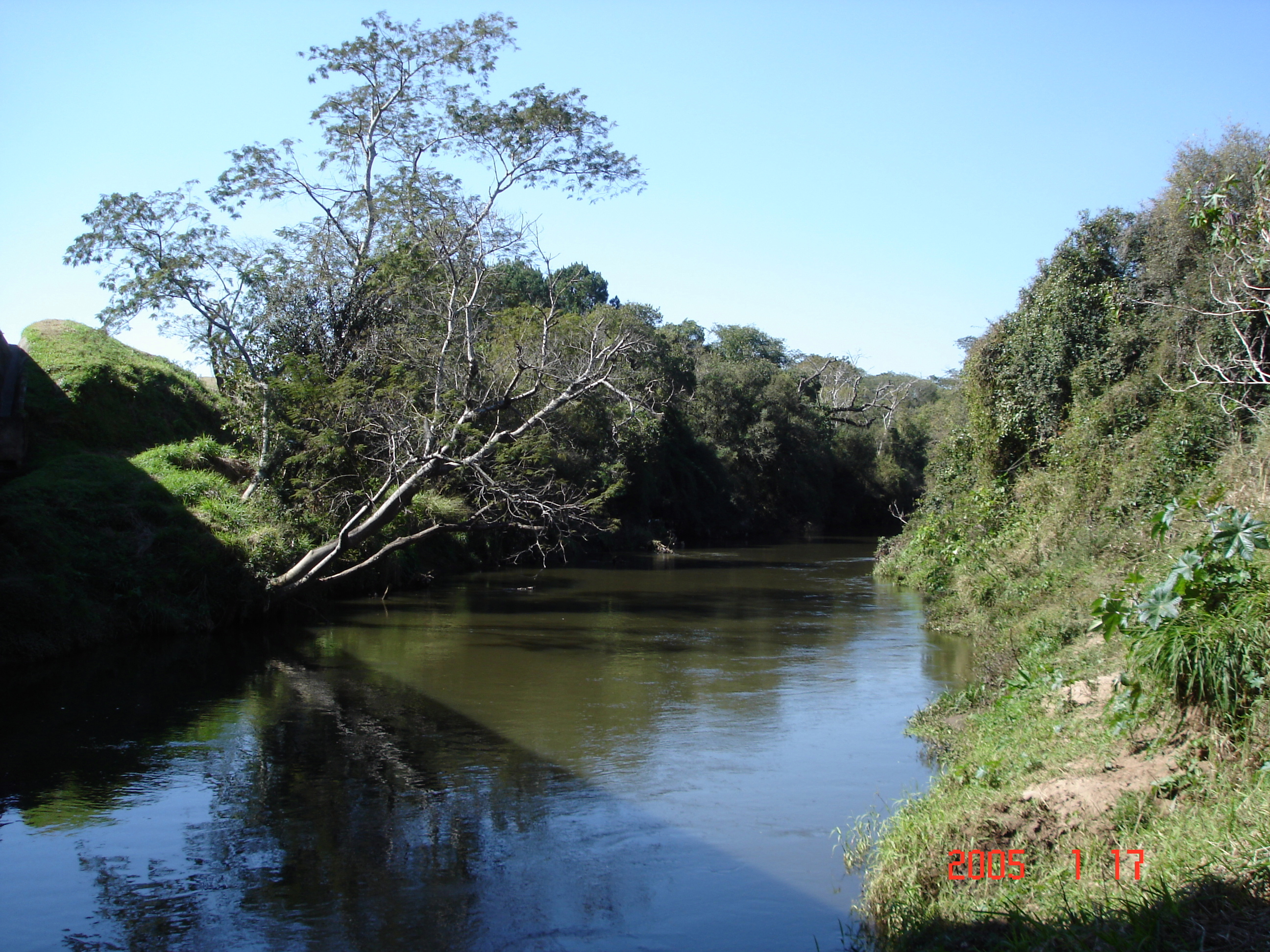 Rio Pitangui, Paraná - Brasil.